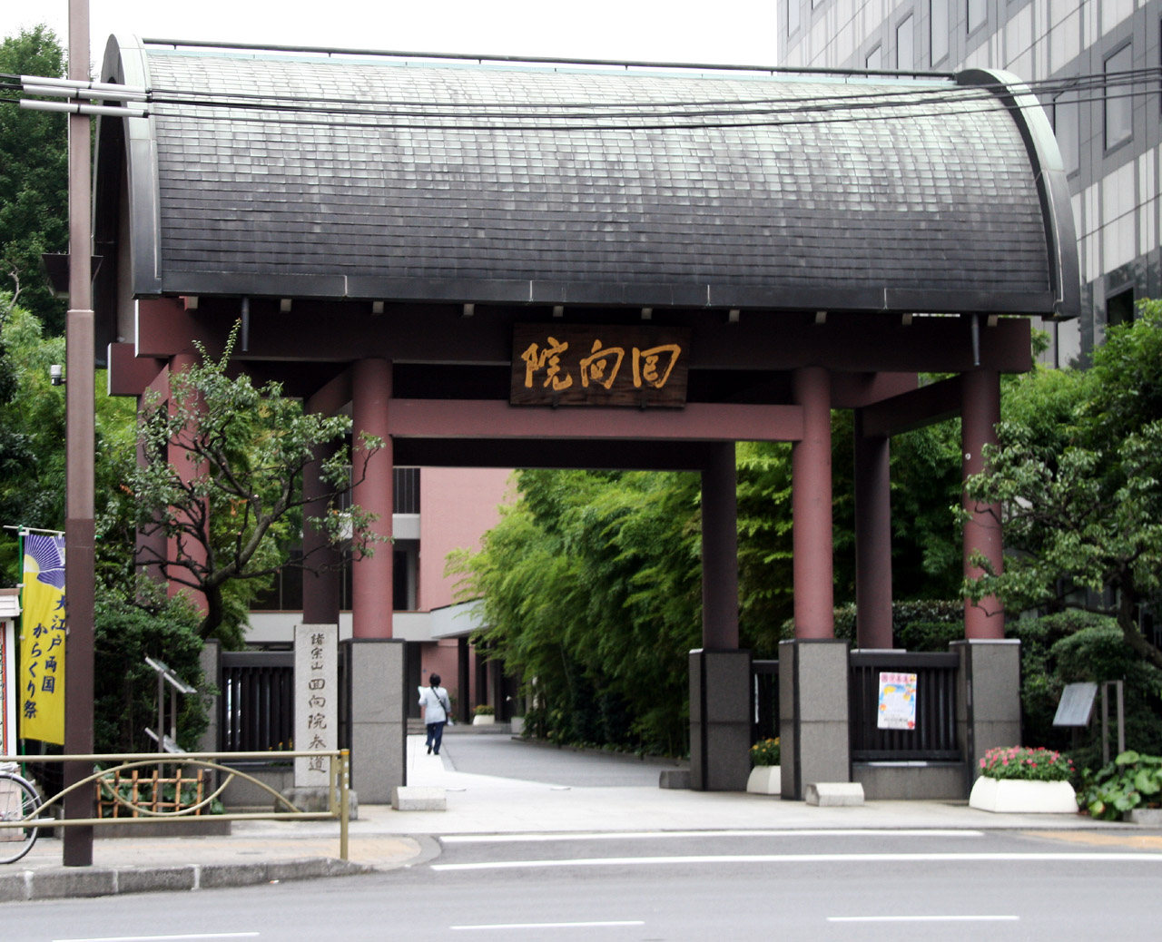 Ekoin